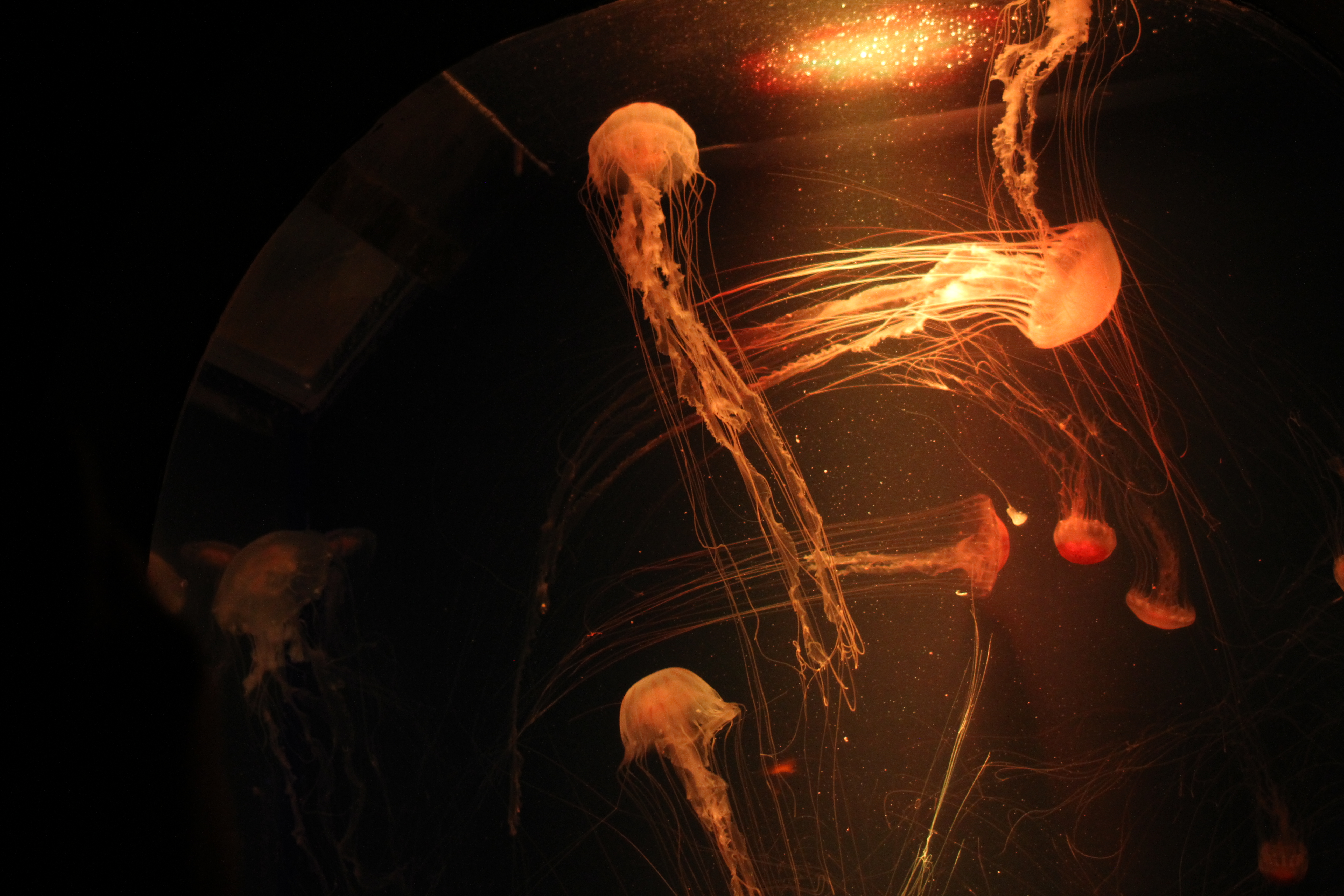 Medusas, mejor conocidas como Ortiga de Mar en todas direcciones.Acuario Inbursa, Ciudad de México, México.